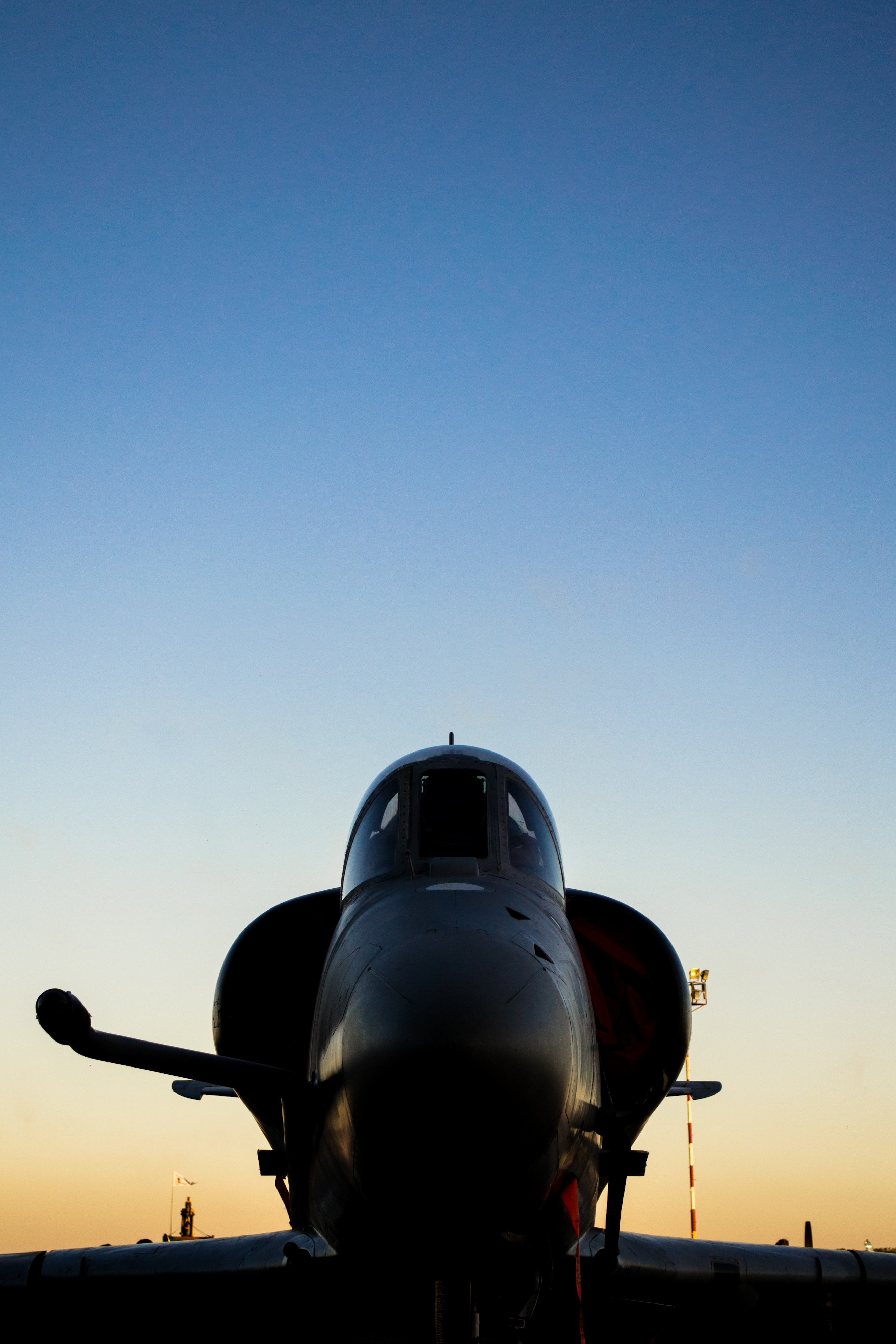 Jornadas de Puertas Abiertas del Centenario de la Aviación Militar Argentina, en la IIª Brigada Aérea, Paraná, Entre Ríos